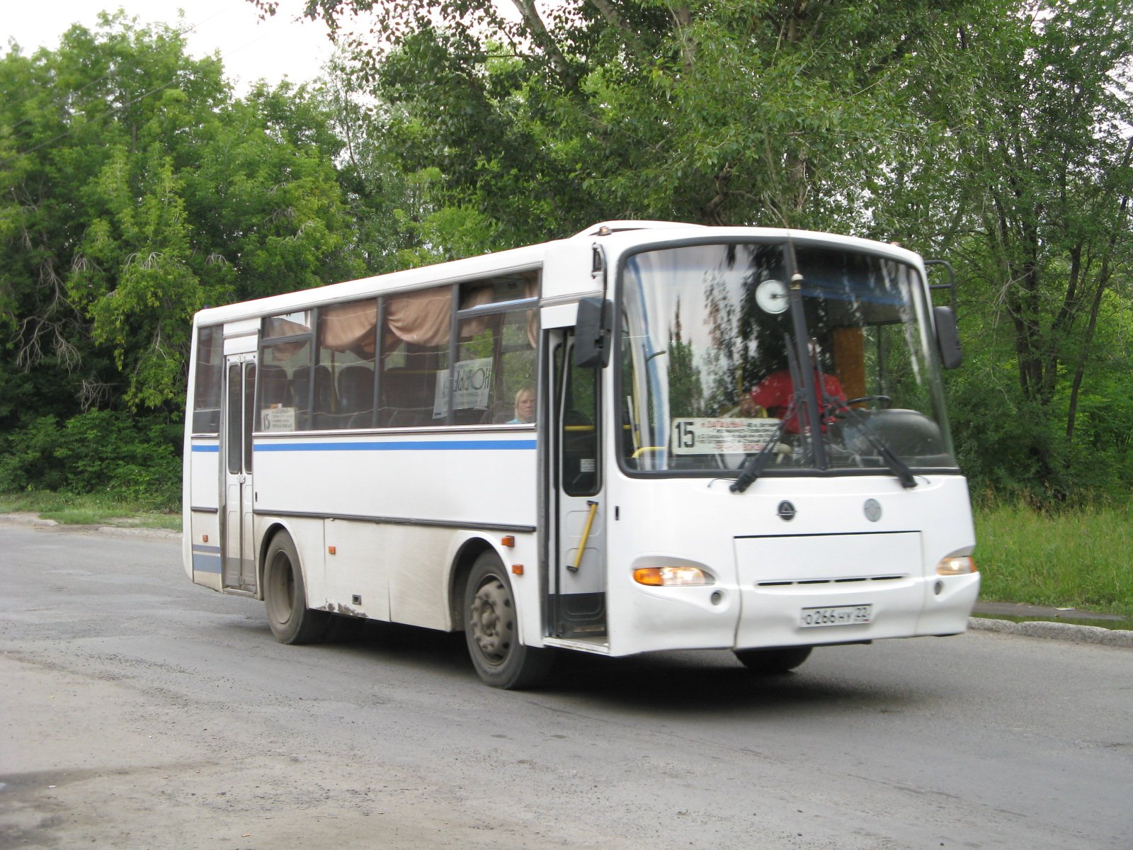 ПАЗ-4230 на проспекте Космонавтов